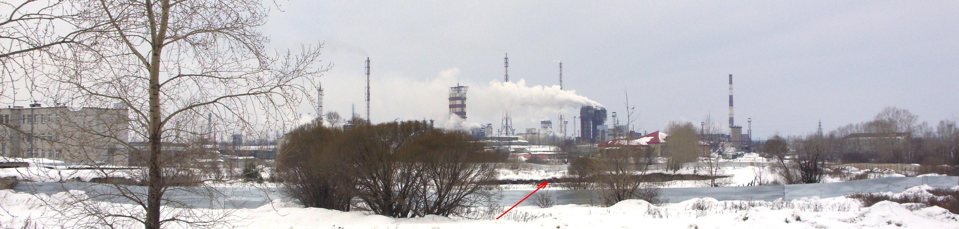 Провал №4 в г. Березники